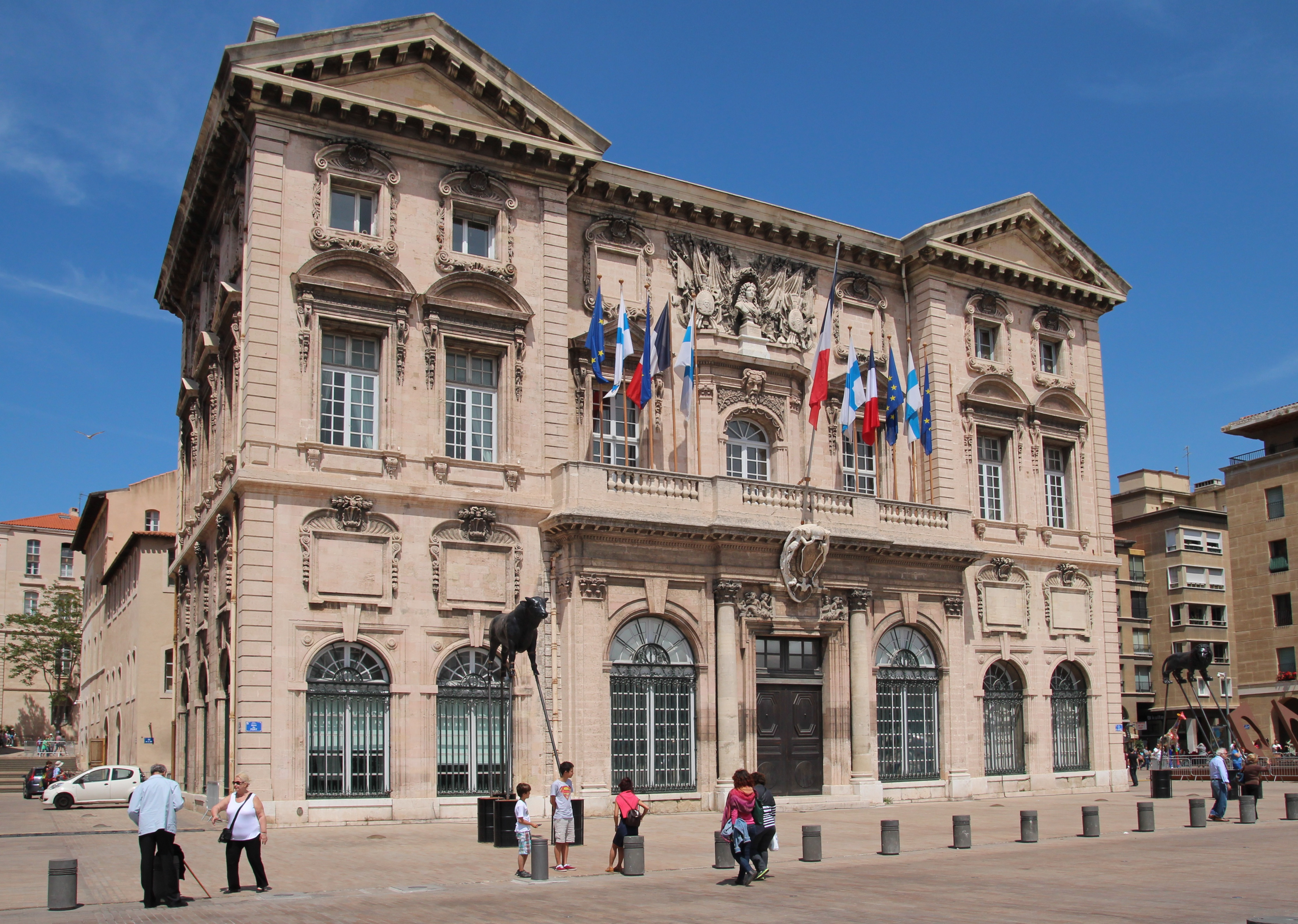 Hôtel de ville de Marseille, sur le vieux port